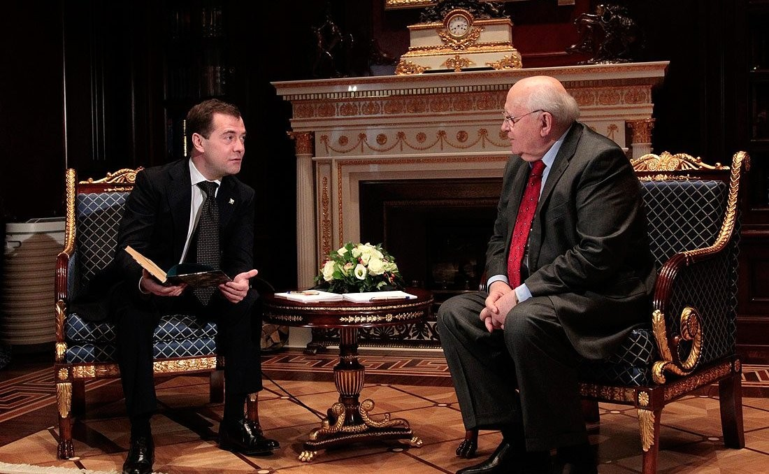 Встреча Президента России Дмитрия Медведева с Михаилом Горбачёвым. Дмитрий Медведев поздравил Михаила Горбачёва с 80-летием.